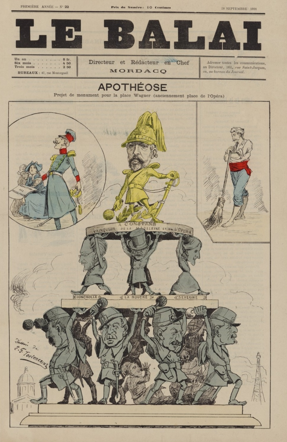 "Apothéose. Projet de monument pour la place Wagner (anciennement place de l'Opéra)".